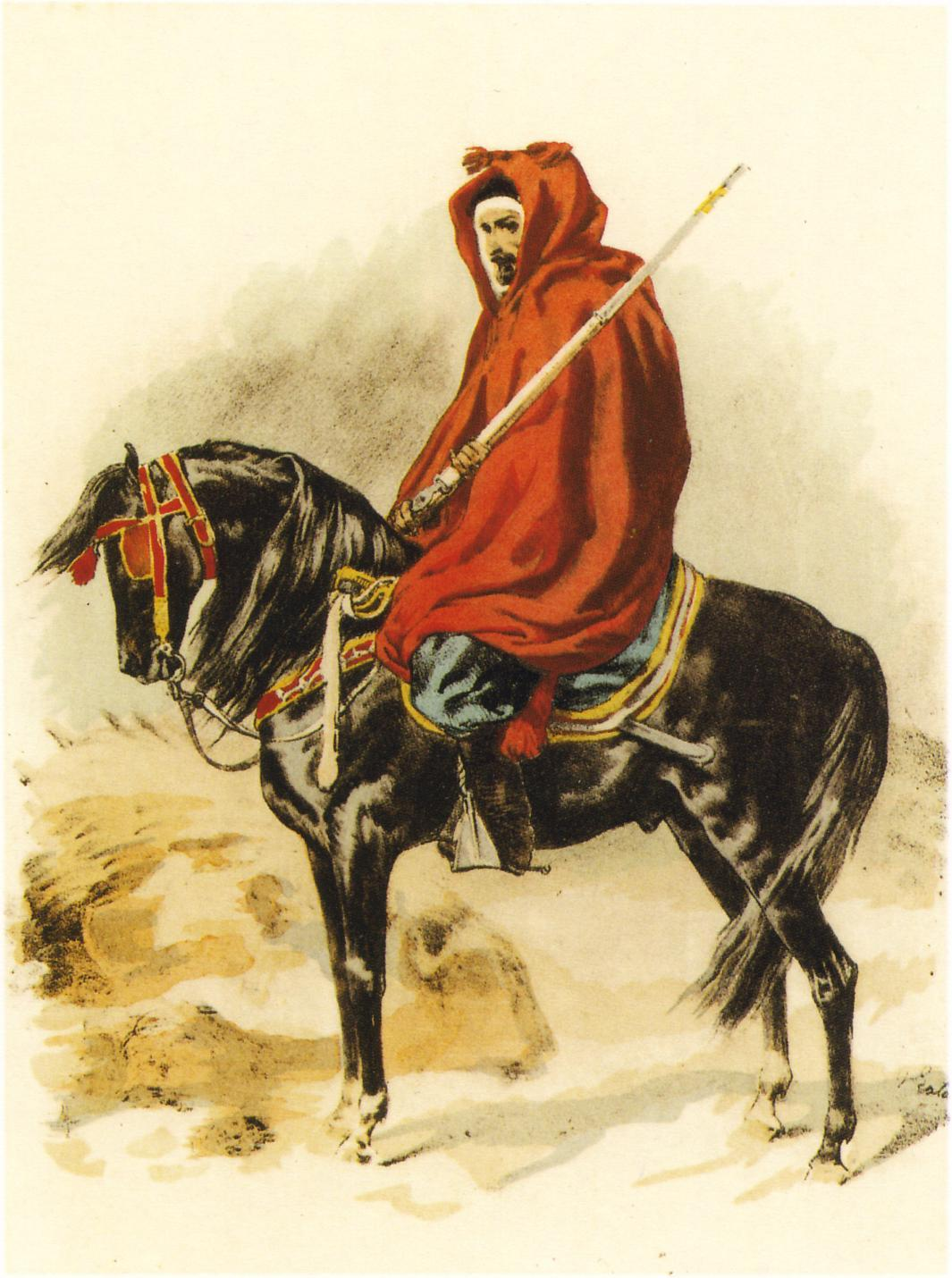 Spahis en costume du second empire. De la série "Types militaires", 59 lithogaphies en couleur de François-Hippolyte Lalaisse, donnant les uniformes français de 1857 à 1870. Becquet frères, lithographes, Morin éditeur.